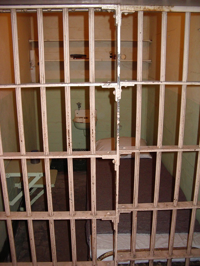 Typische Zelle im Gefängnis von Alcatraz